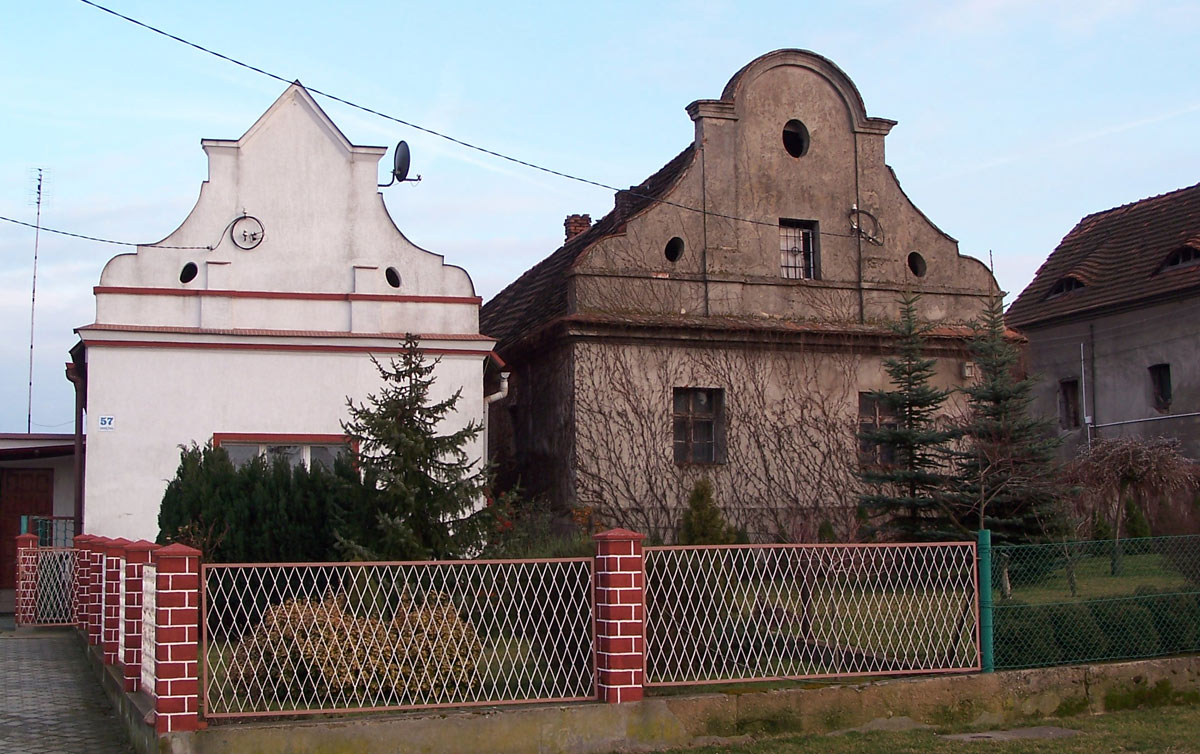 Domy przy ul. Okrężnej w Głogowie - Brzostowie.